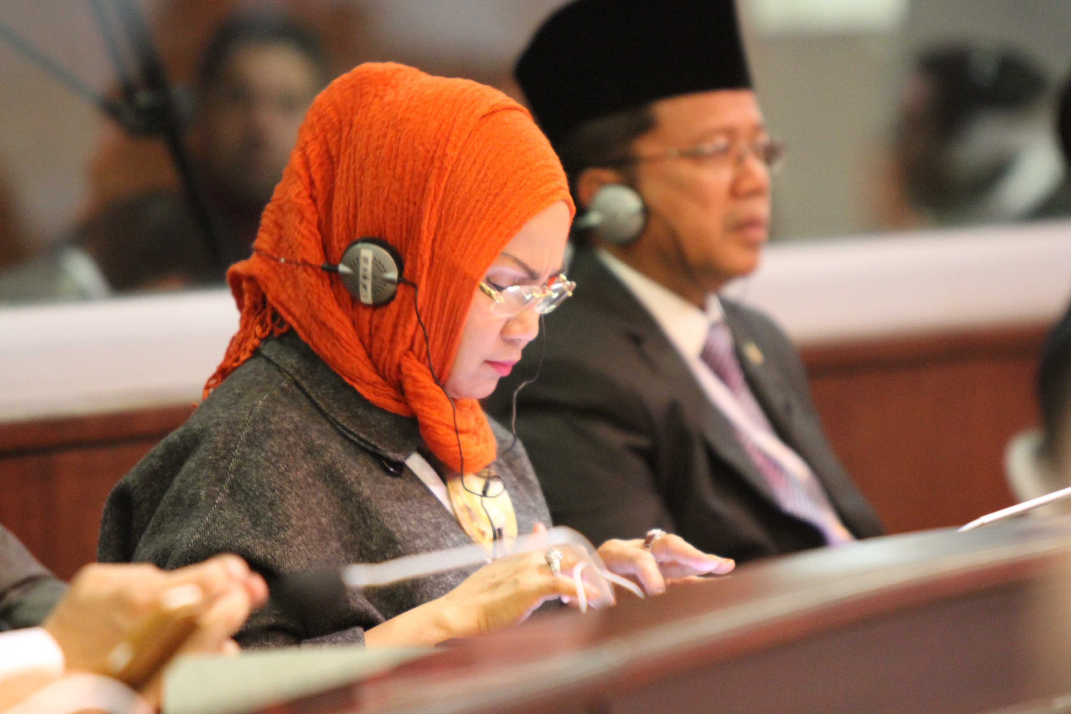 Quito, 13 enero de 2015.-Conferencia Magistral de Ricardo Patiño, canciller de la República del Ecuador en el Foro Parlamentario Asia Pacífico